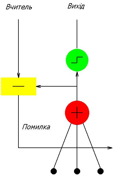 ADALINE